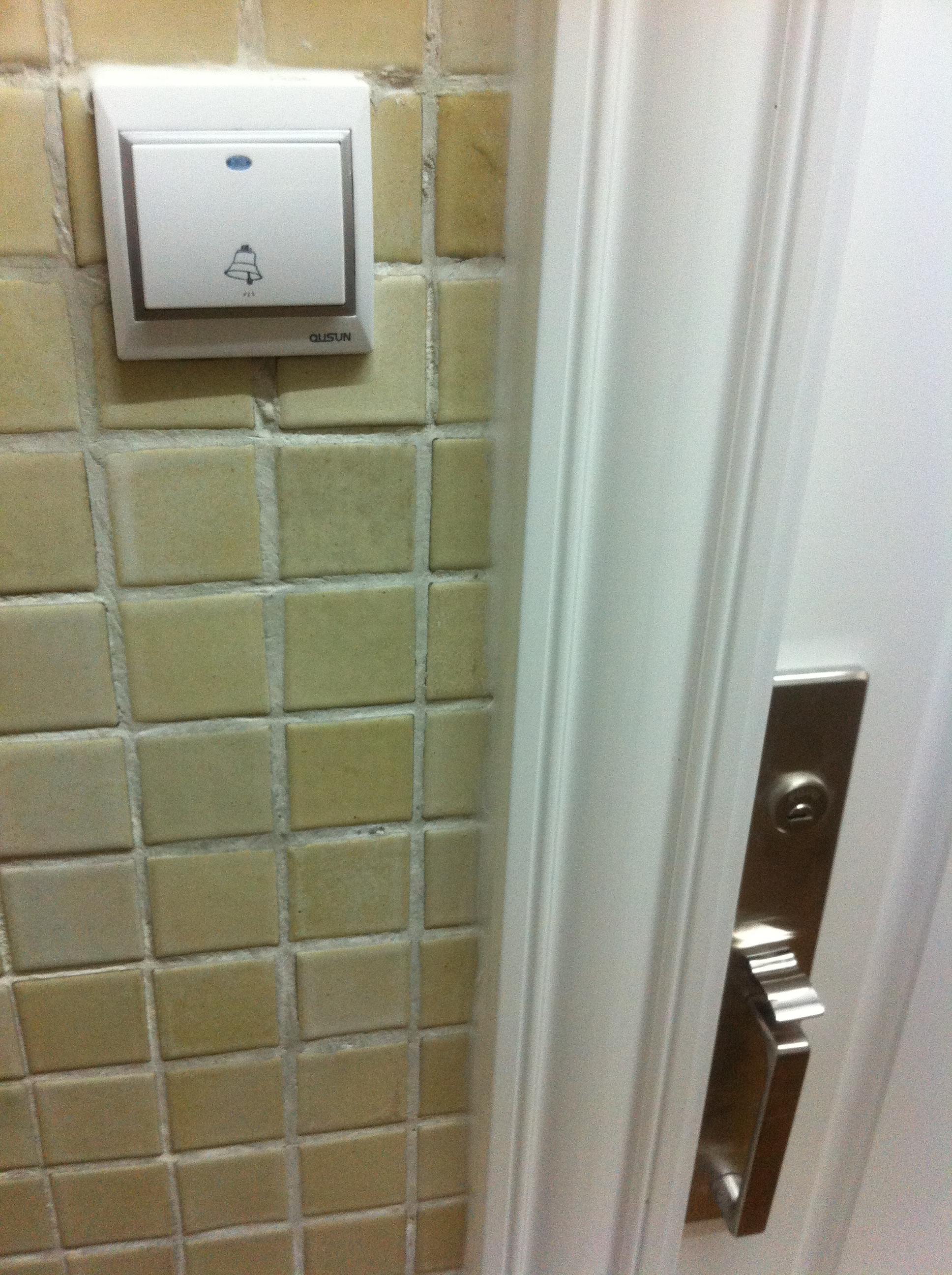 中文（香港）: 門鈴